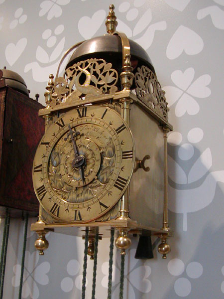 Lantaarnklok met het opschrift: Richard Ames Neere St. Andrew's Church in Holborn Londini Fecit. Foto gemaakt in het Nederlands Goud-, Zilver- en Klokkenmuseum in Schoonhoven.